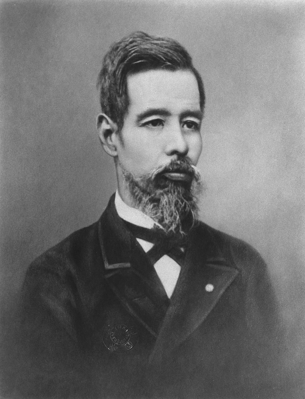 Portrait of Mutsu Munemitsu (陸奥宗光, 1844 – 1897)